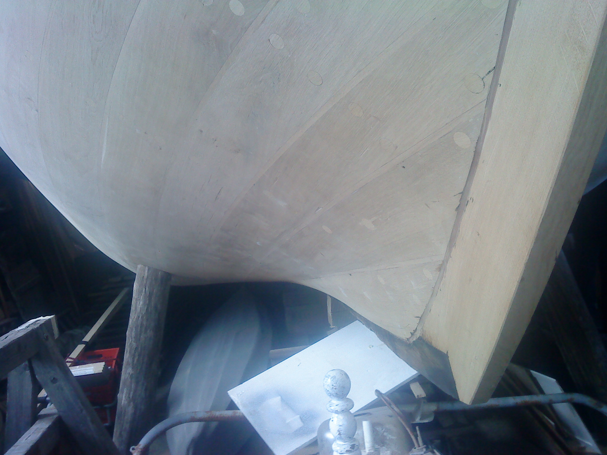 Zeesenboot Unterwasserschiff (Bug)